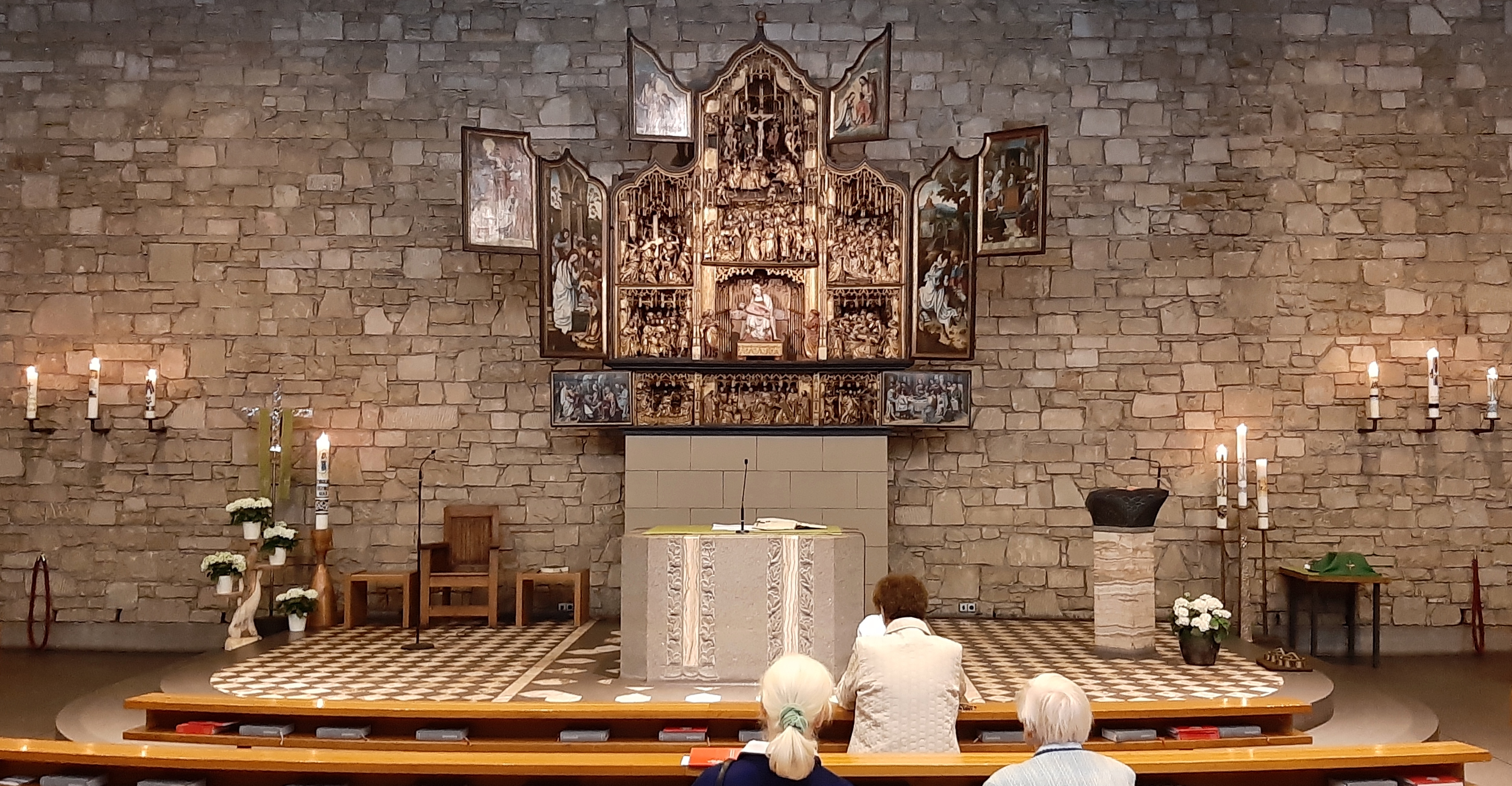 Schmerzhafte Mutter von Heimbach mit Schnitzaltar